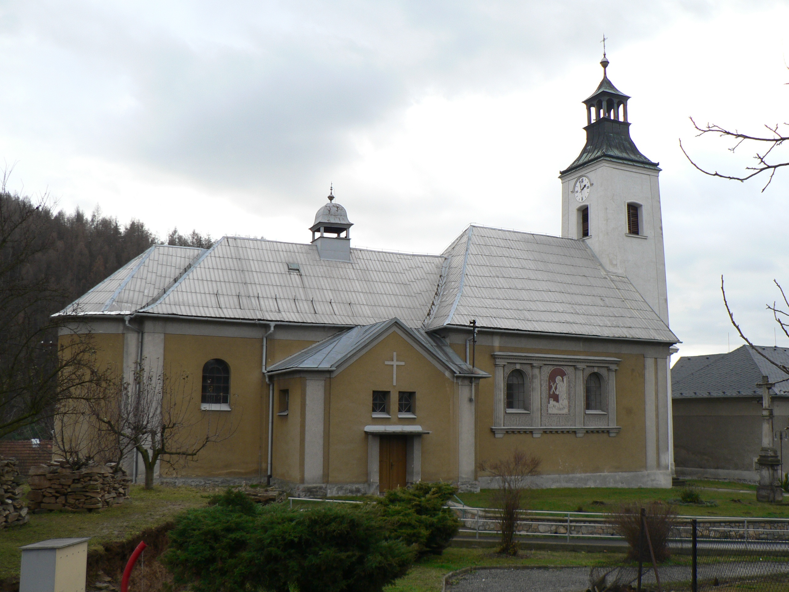 Kostel svatého Jakuba Většího (Lesnice)